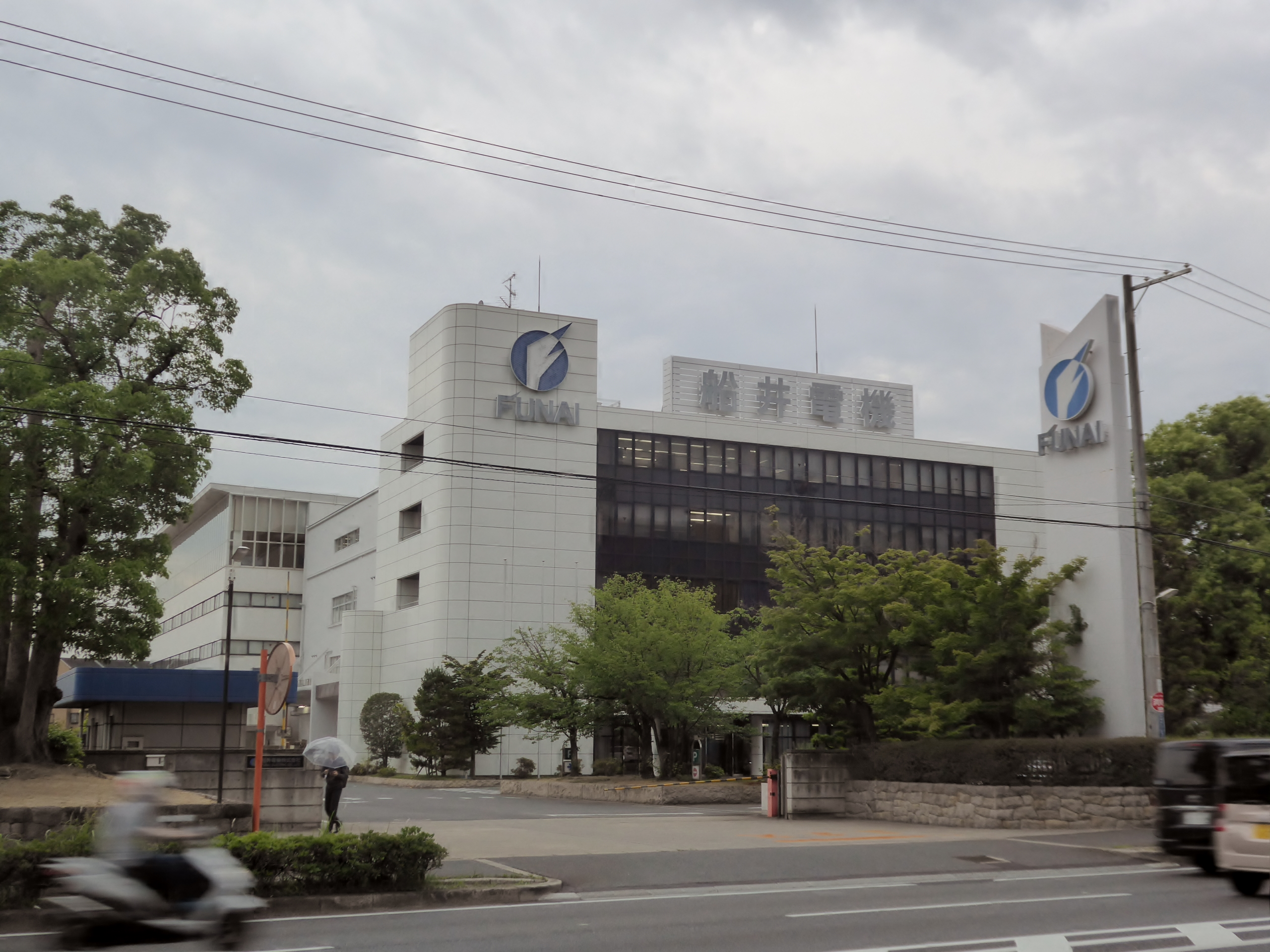 船井電機株式会社本社を撮影。